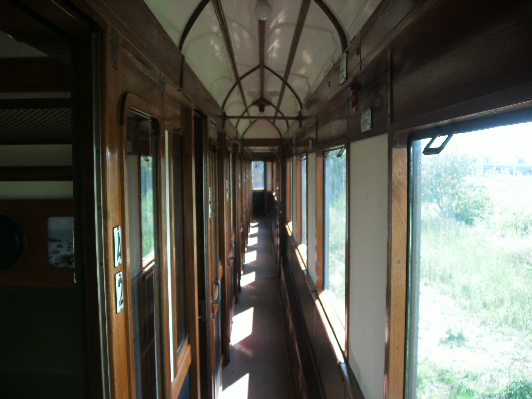 Gangpad met links de coupés